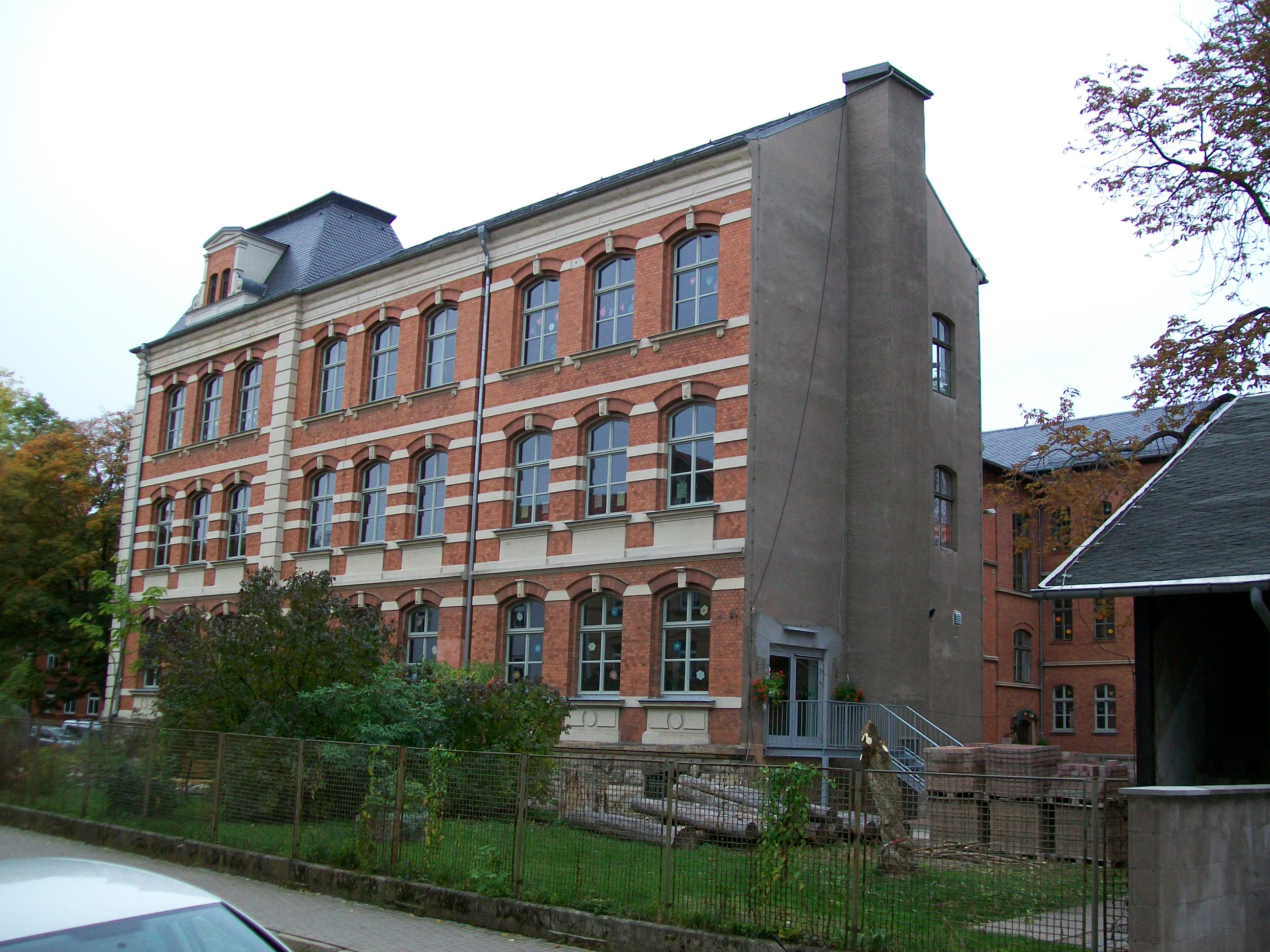 Ein Teil der Emil-Petri-Schule in Arnstadt (Deutschland).